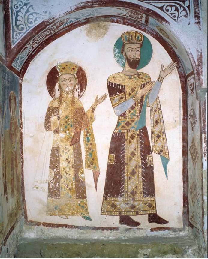 გელათის ფრესკა